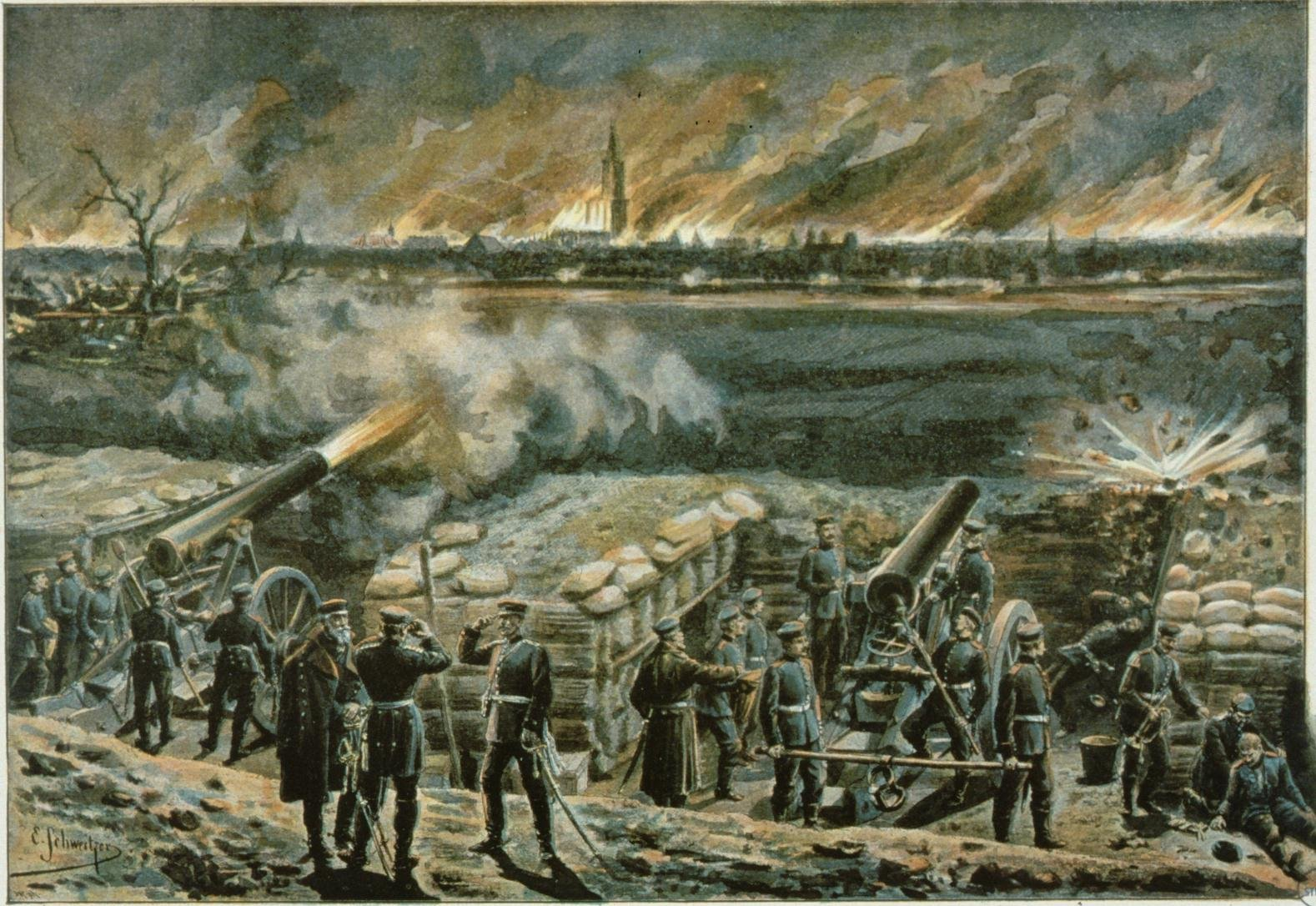 Batterie de siège au Wacken durant le siège de Strasbourg en 1870.